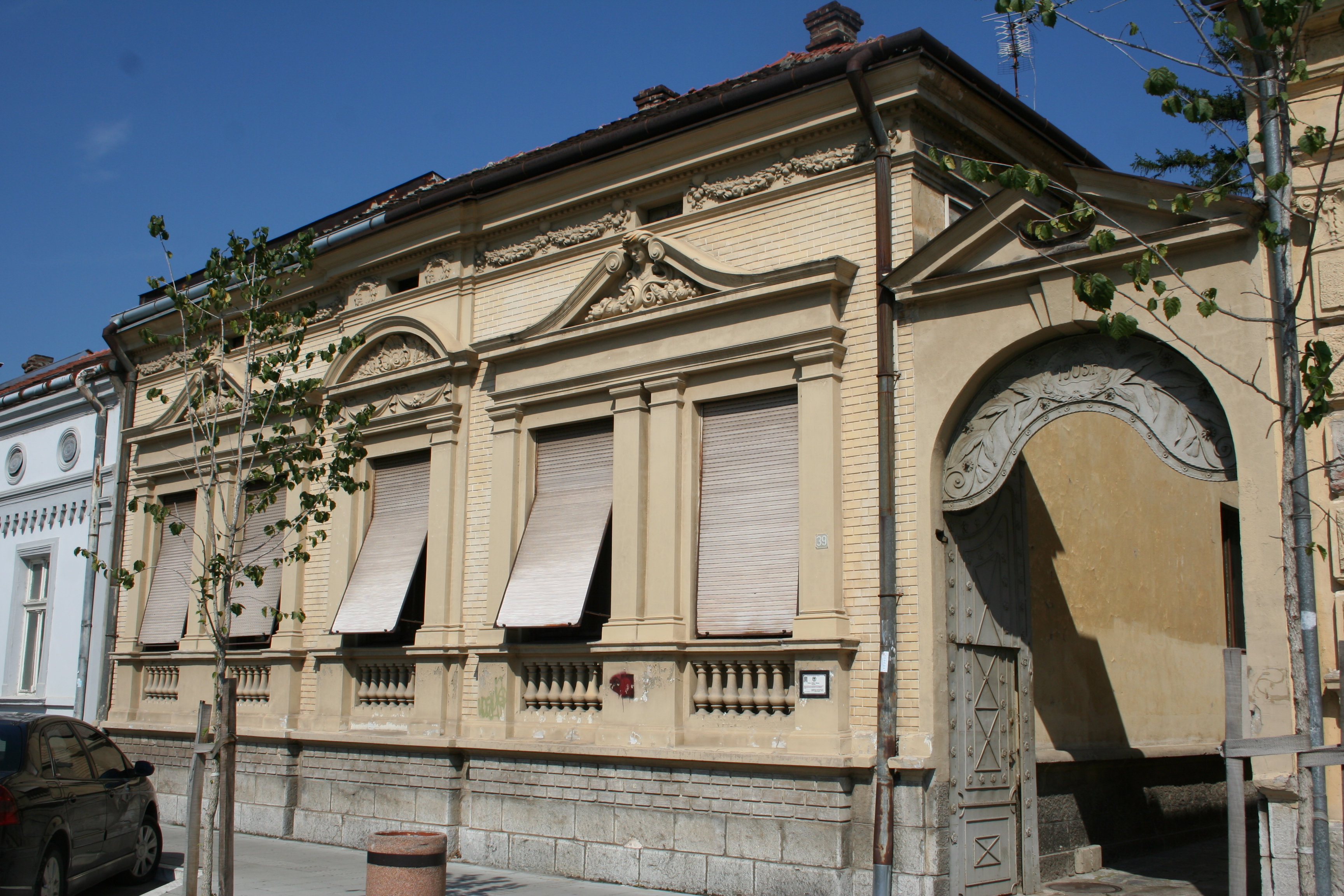 Kuća, Karađorđeva 41, Valjevo